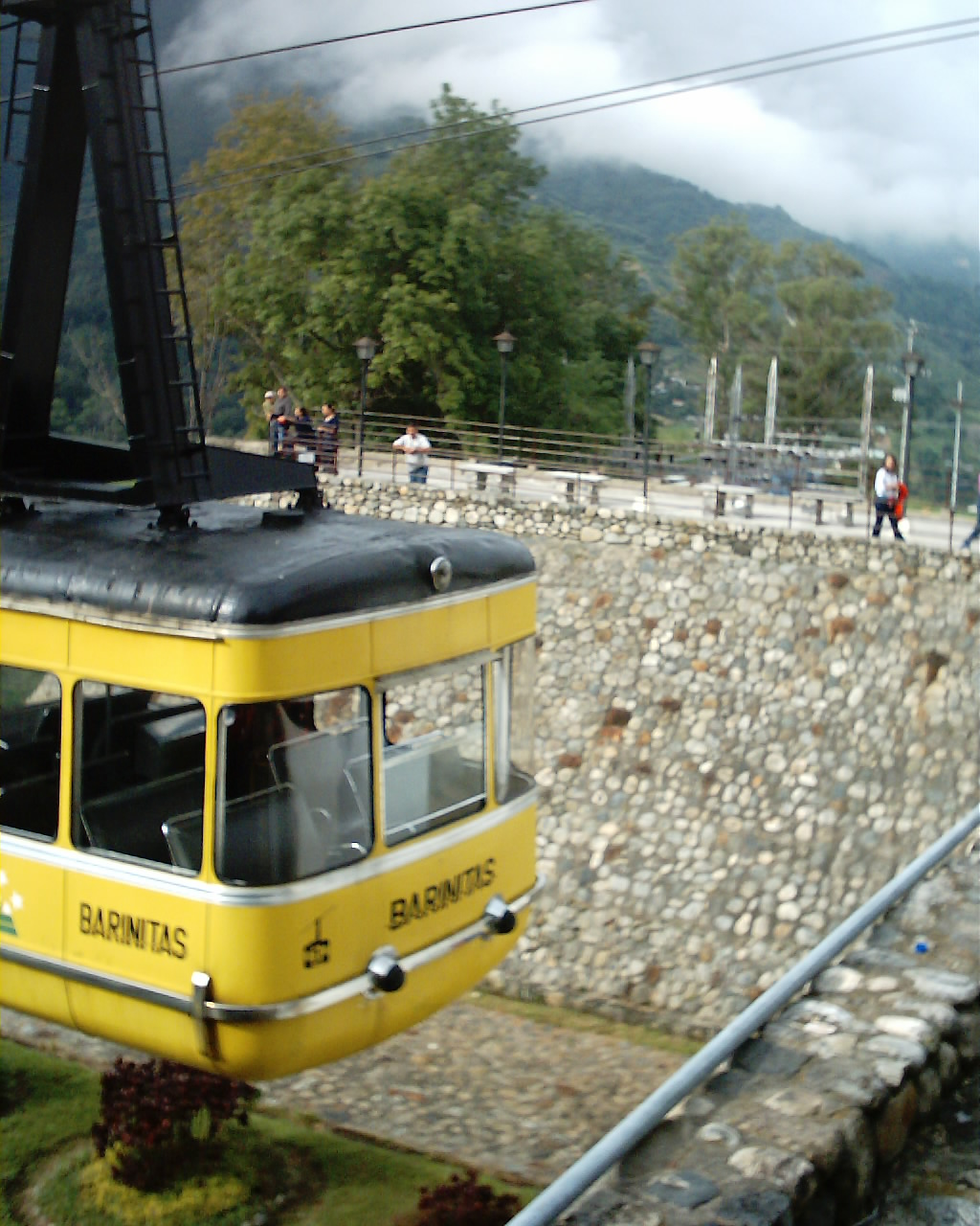 Esta foto fue tomada por Venex en el año 2005. La misma ha sido liberada al dominio público. en la foto se muestra la cabina del teleférico de Mérida en la estación Barinitas.